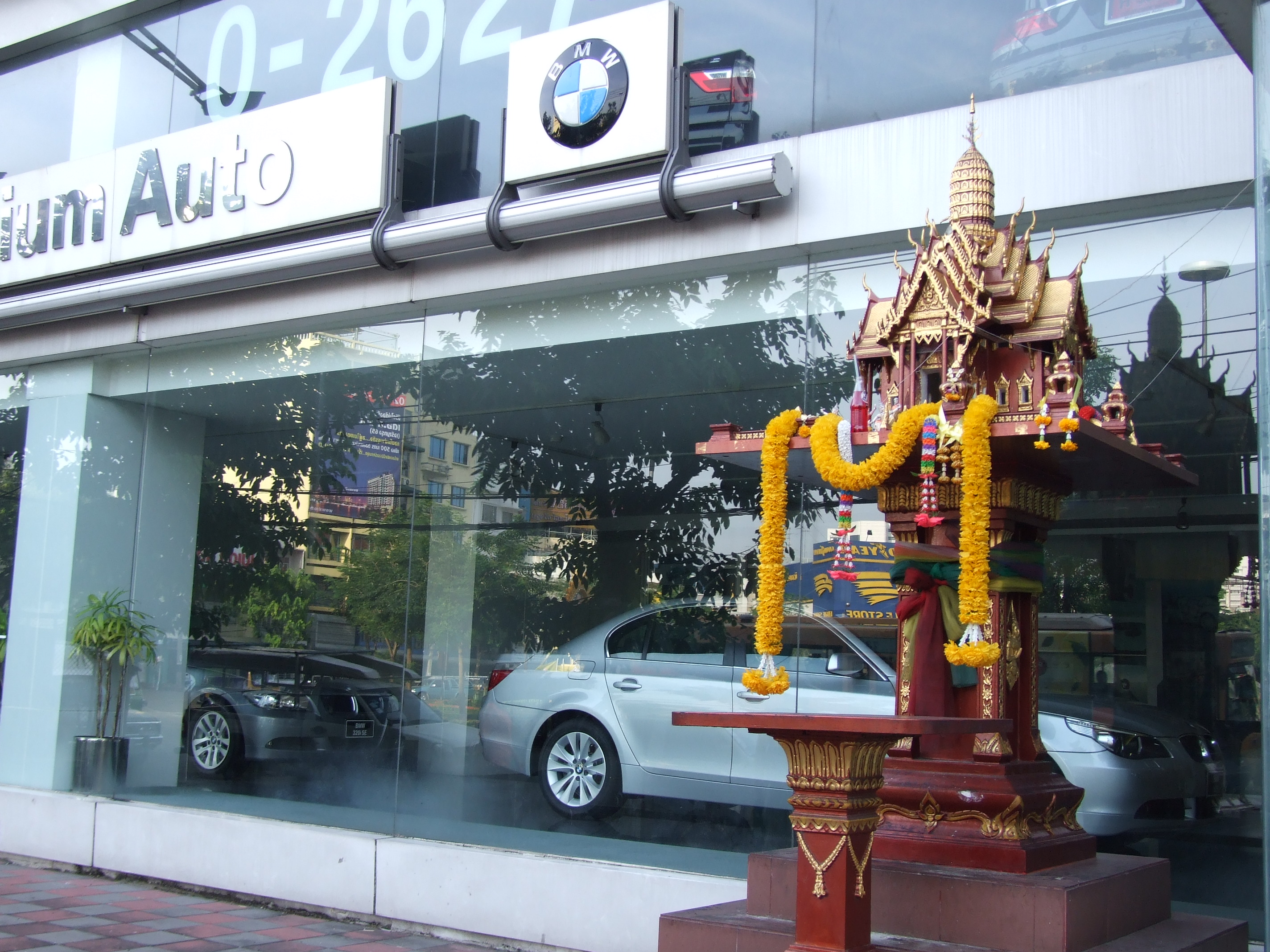 Geisterhaus BMW Bangkok / Spirit house